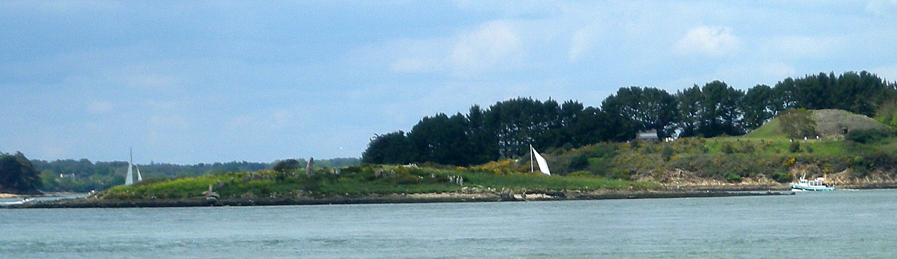 Er Lannic depuis la pointe de la Palisse, sur la presqu'île de Rhuys derrière le Cairn de Gavrinis.